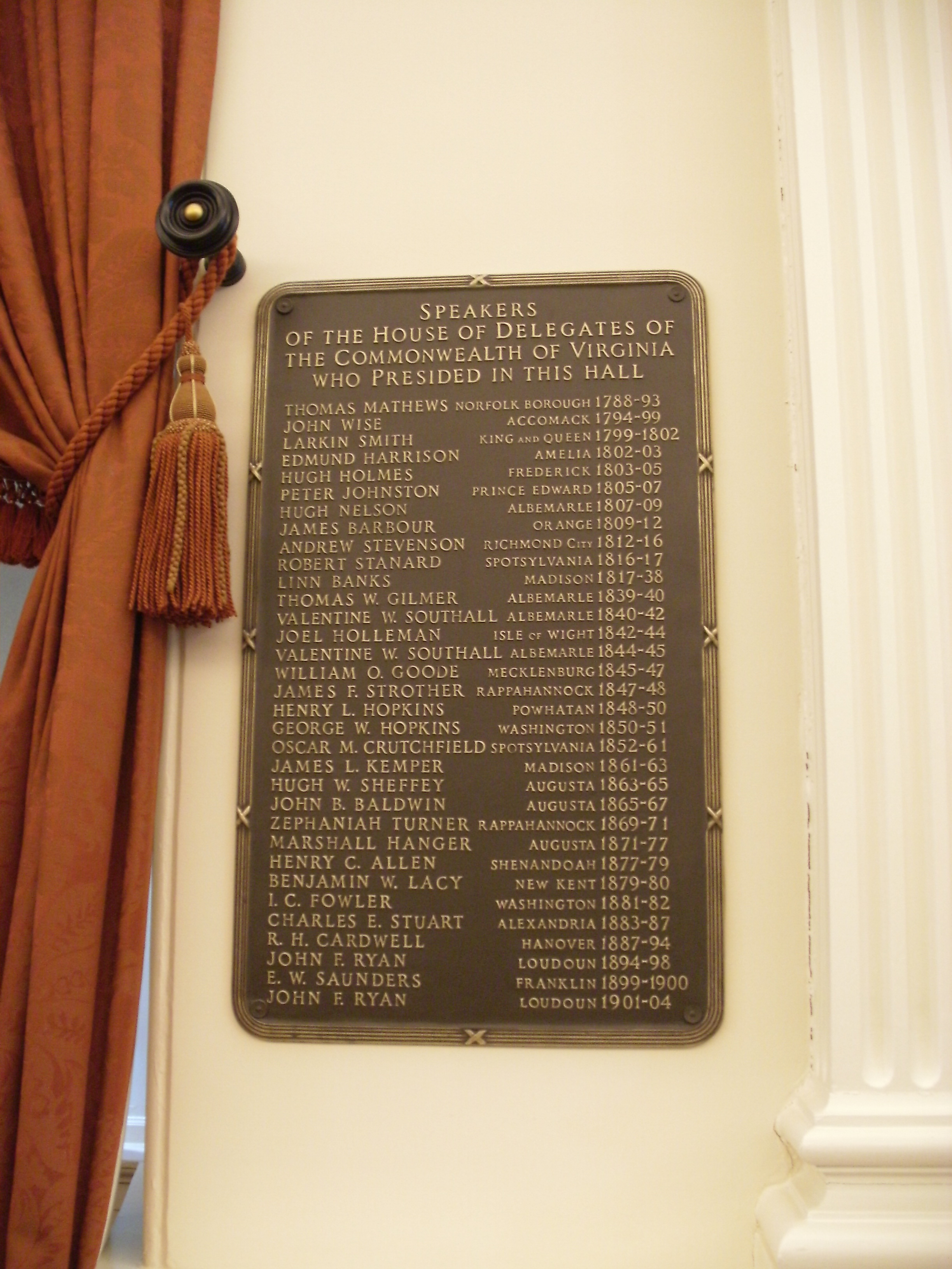 Virginia State Capitol, Richmond, VA GEDSC DIGITAL CAMERA